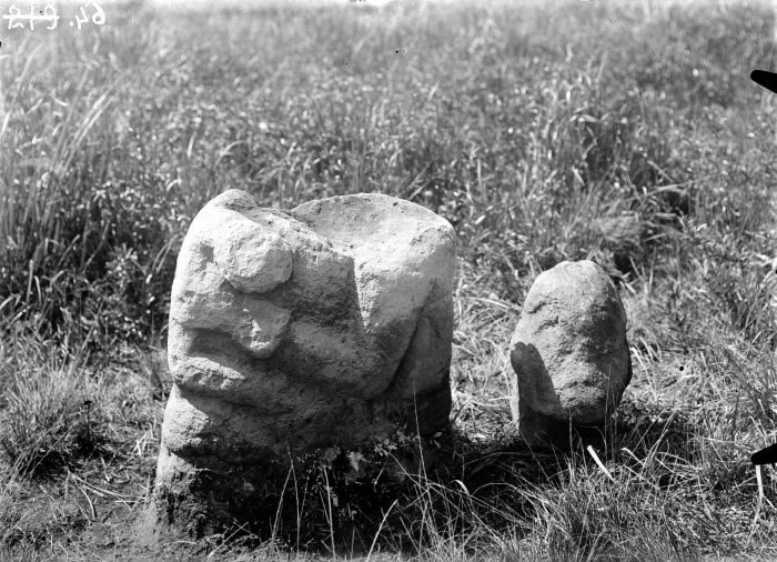 Negatief. Megalitisch beeld bij Nanding